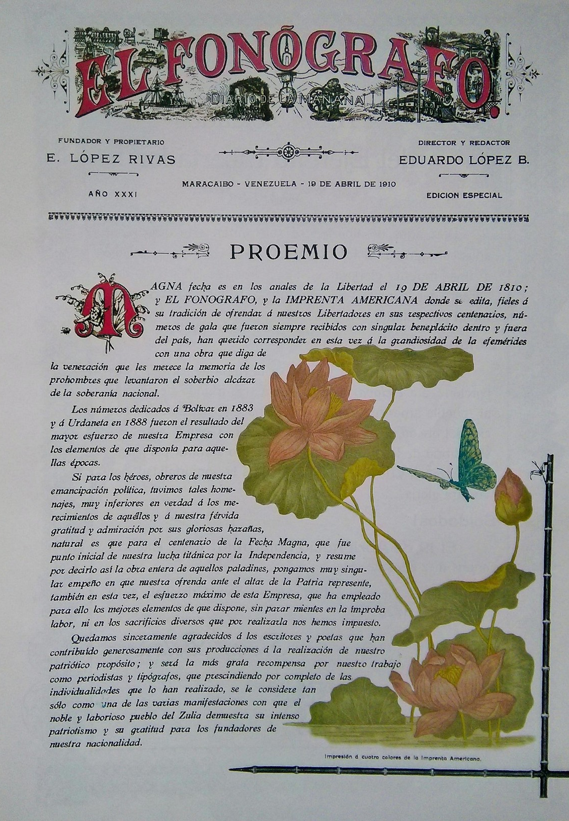 Prólogo de la edición de gala del diario "El Fonógrafo" de Maracaibo, en ocasión de cumplirse el centenario de la independencia de Venezuela. La edición se publicó el 19 de abril de 1910.